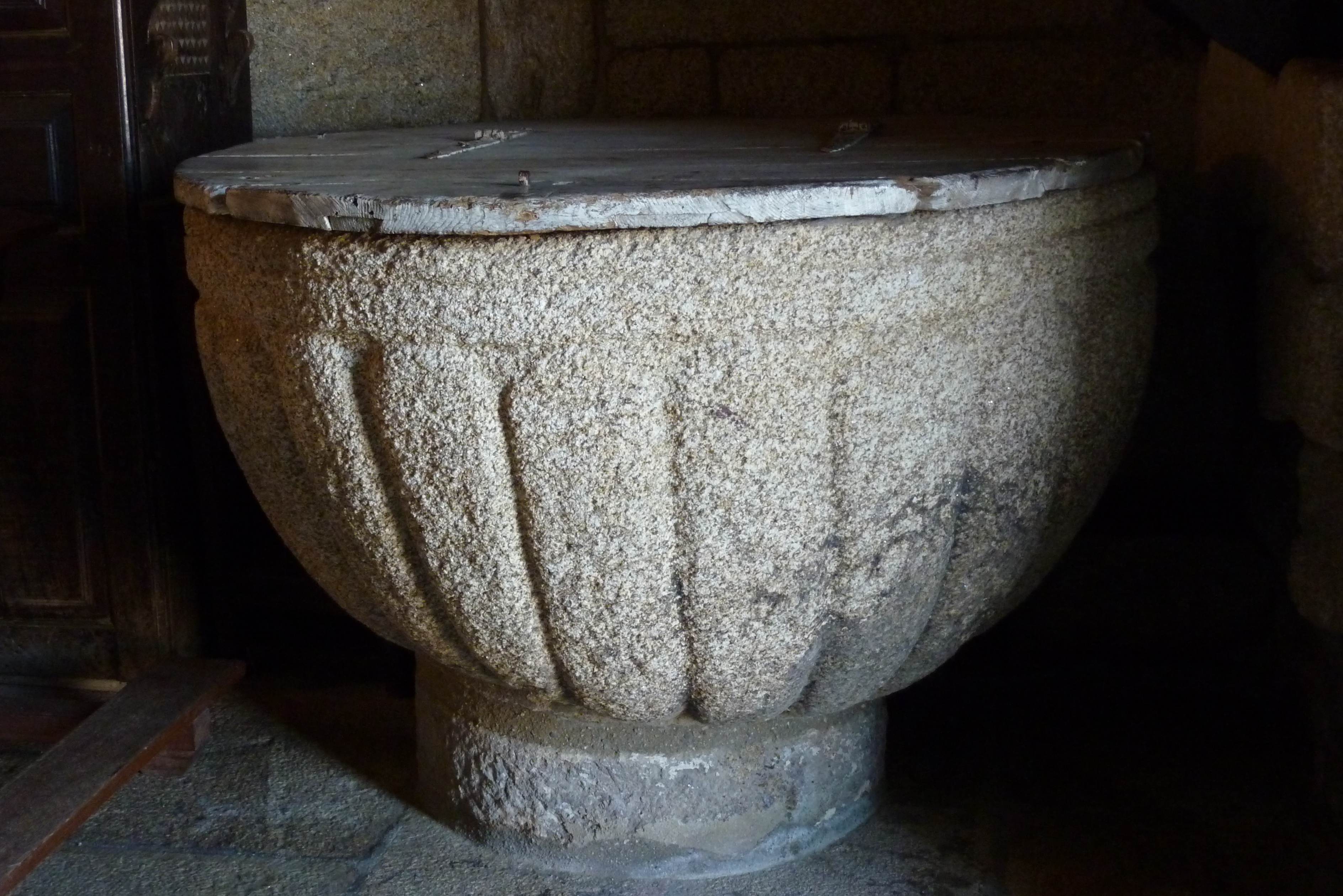 Pfarrkirche San Pedro (A Mezquita), romanischer Taufstein